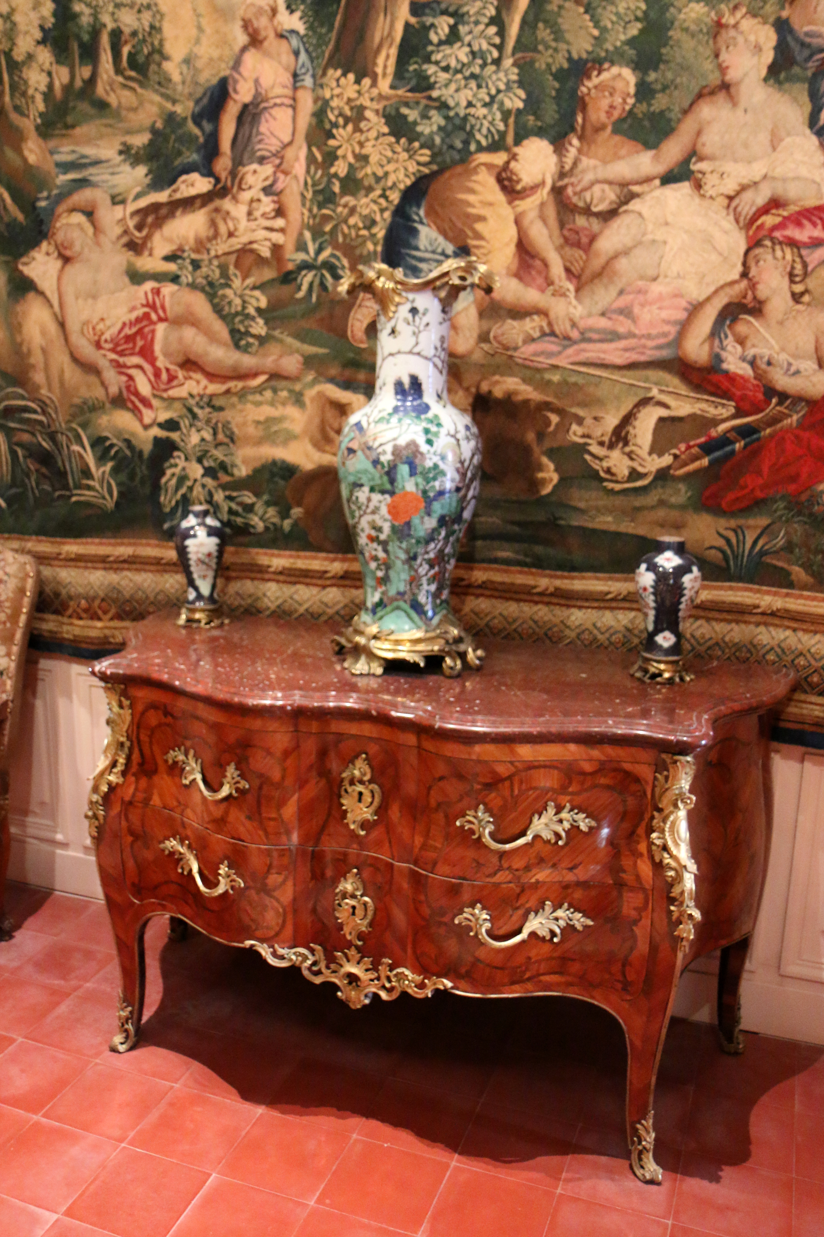 Commode deux tiroirs estampillée Pierre Migeon IV, vers 1755-1760. (Height: 86 cm (33.8 in); Width: 145 cm (57 in); Depth: 63 cm (24.8 in) dimensions QS:P2048,86U174728;P2049,145U174728;P5524,63U174728)